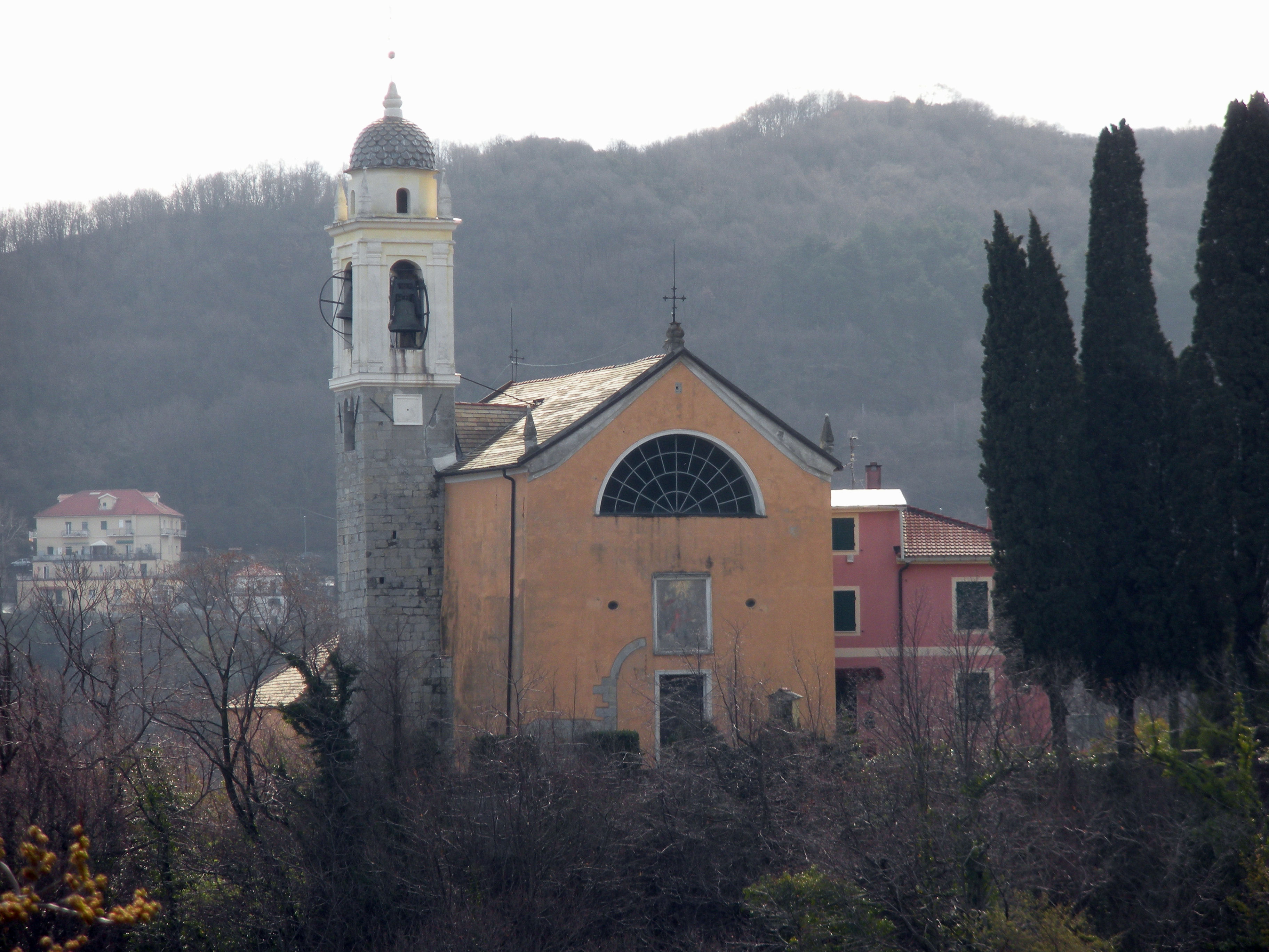 Chiesa di S. Margherita di Casanova (S. Olcese, prov. Genova) Foto propria Marzo 2010